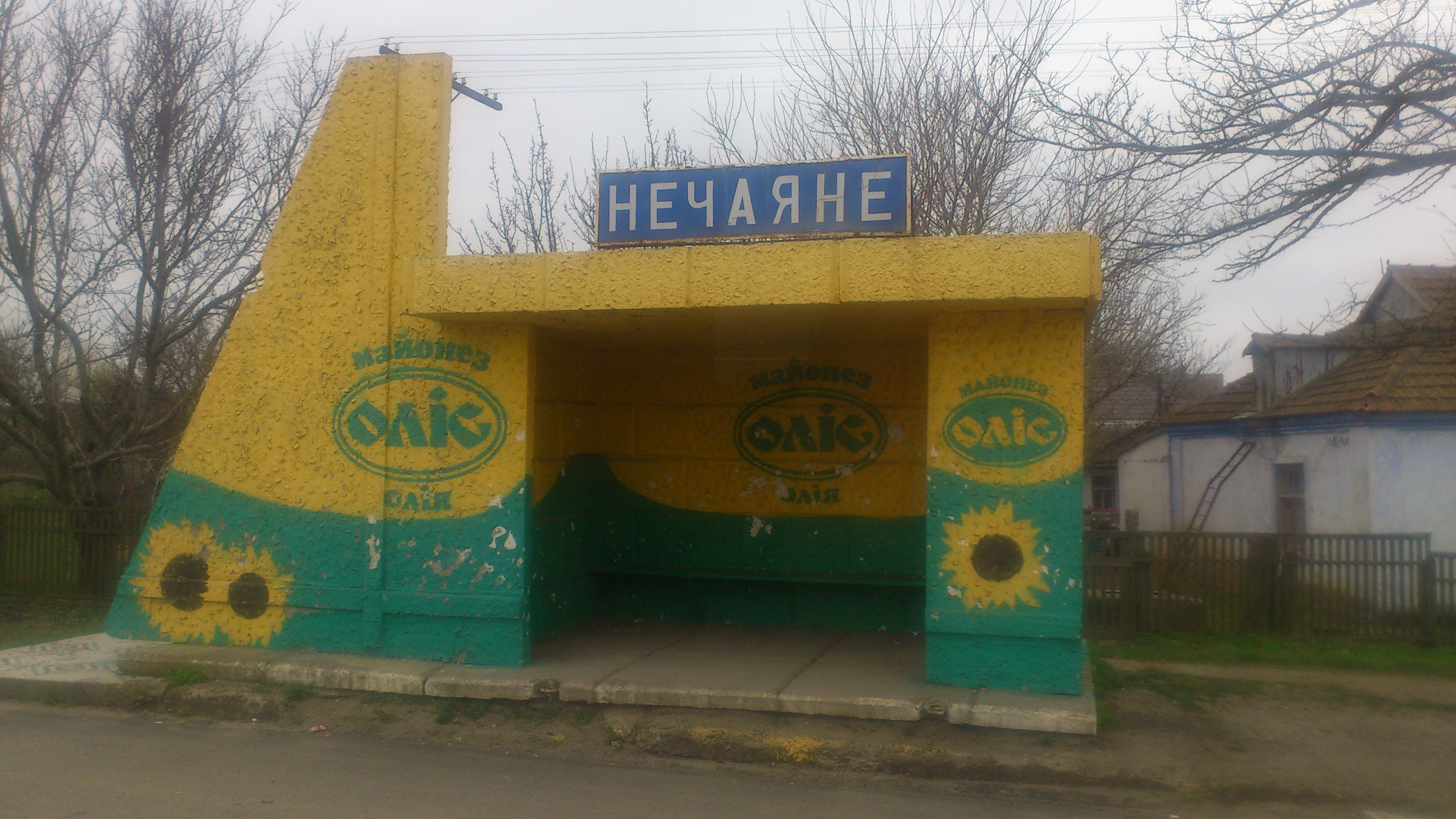 Зупинка села Нечаяного на трасі Одеса-Миколаїв